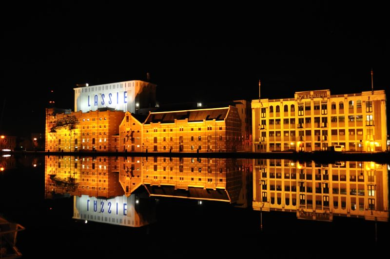 Oude industriewand in Wormer noord holland